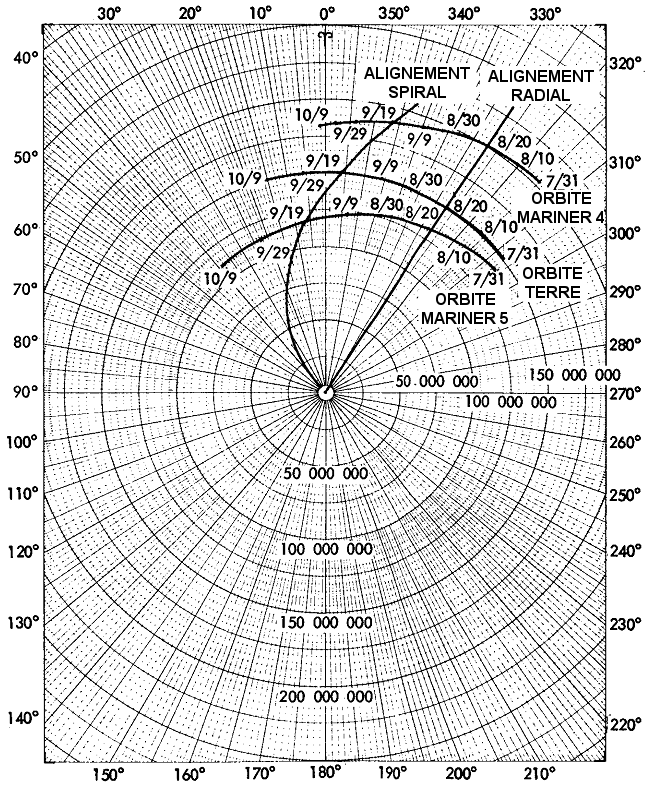 Entre août et septembre 1967, les positions des sondes Mariner 4, Mariner 5 et de la Terre évoluaient entre deux configurations idéales pour l'étude de la propagation des vagues de particules.